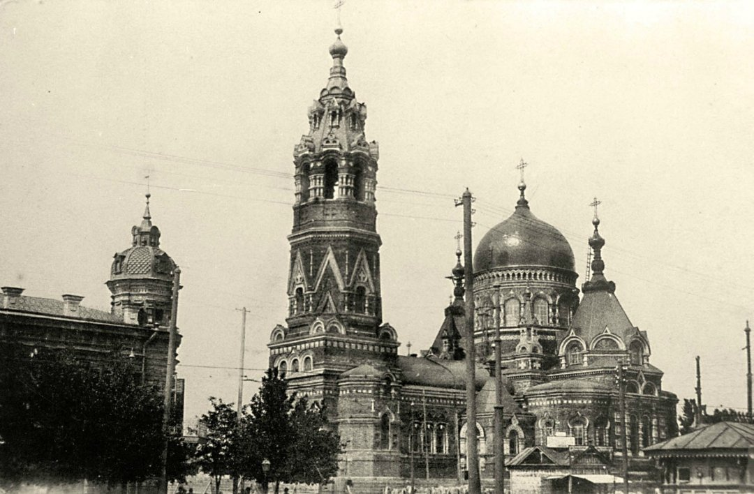 Ново-Покровская церковь. Ростов-на-Дону.